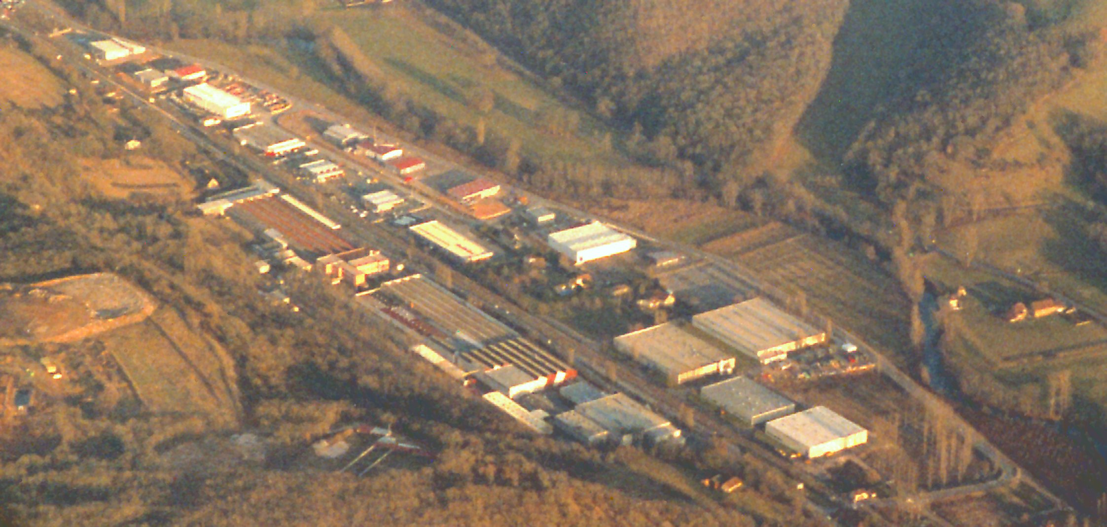 Vue aérienne de Figeac, Lot, France : Zone industrielle Ratier-Figeac